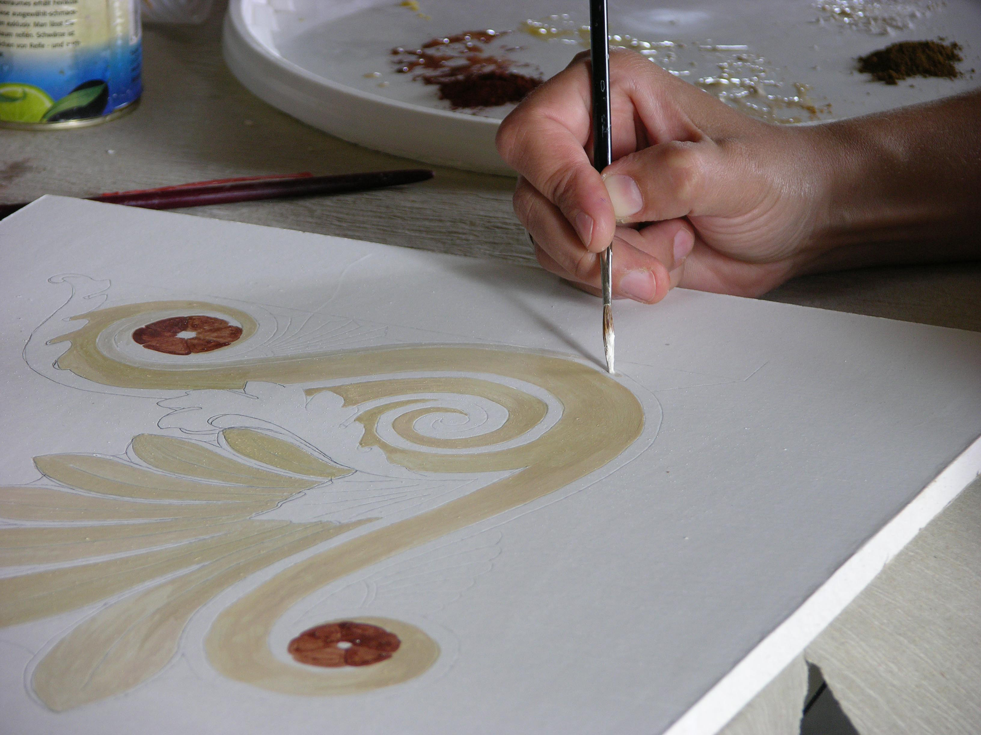 Übung in der Malerwerkstatt